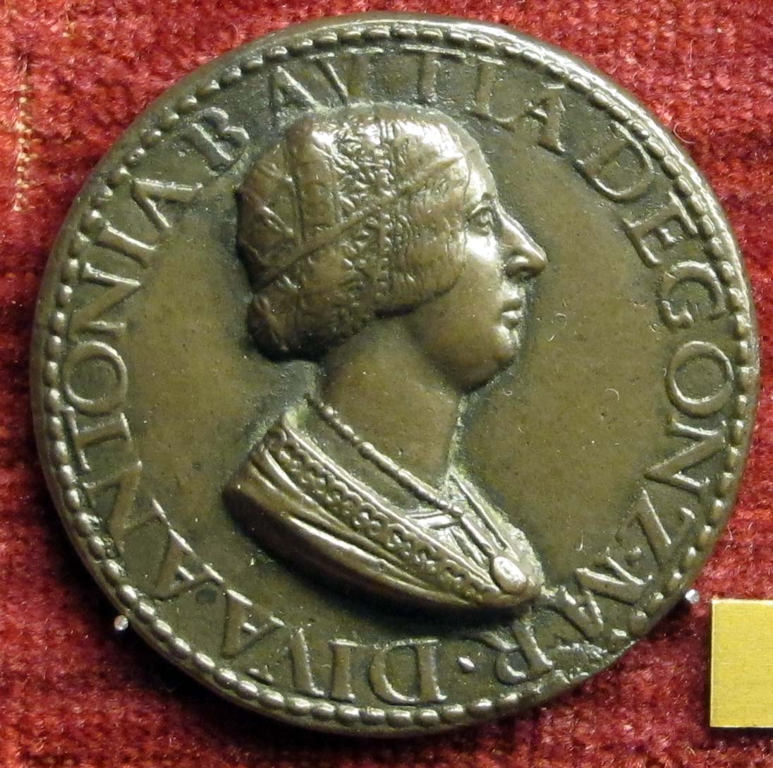 L'antico, medaglia di antonia del balzo, moglie di gianfrancesco gonzaga di rodigo